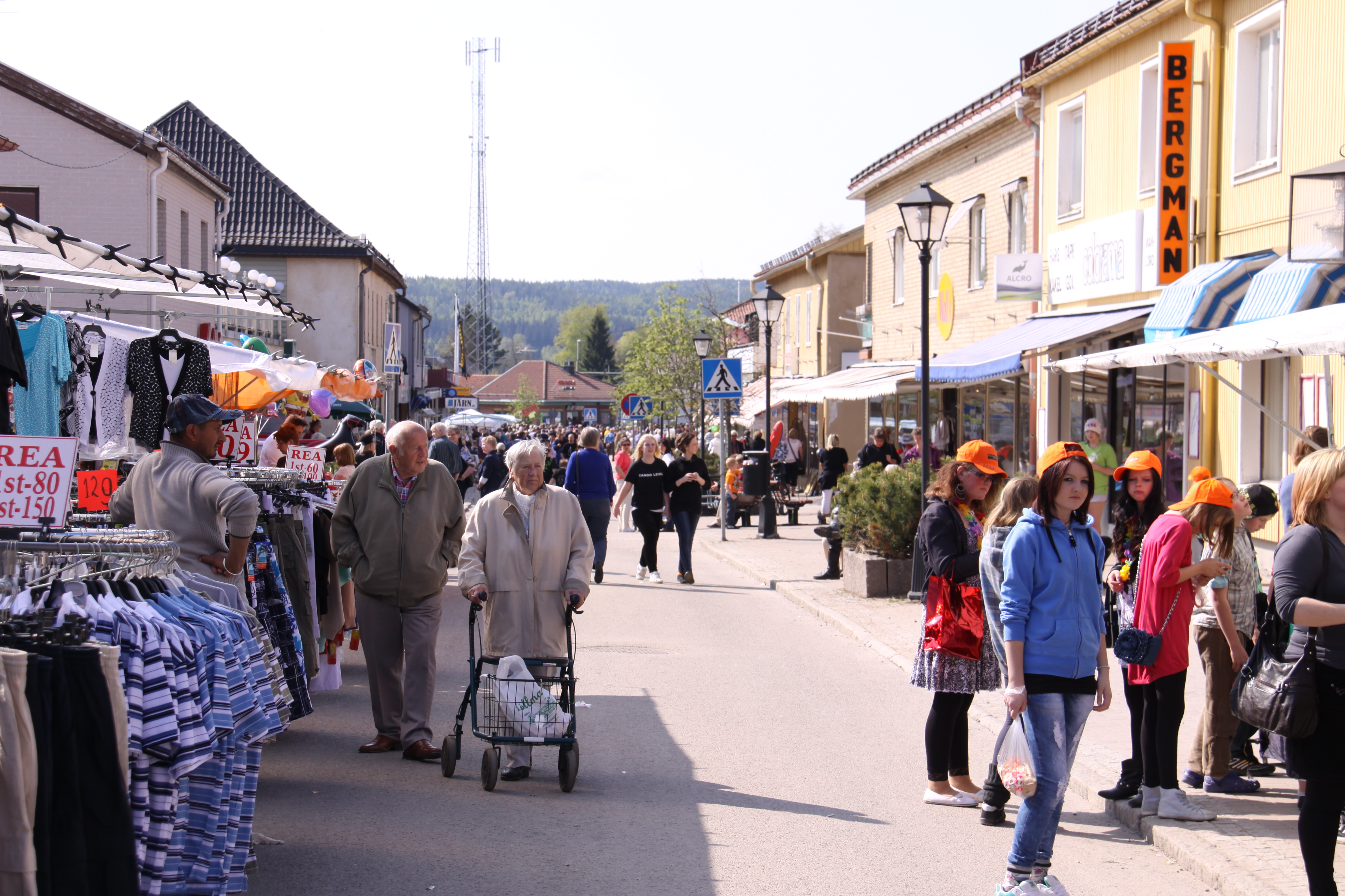 Storgatan